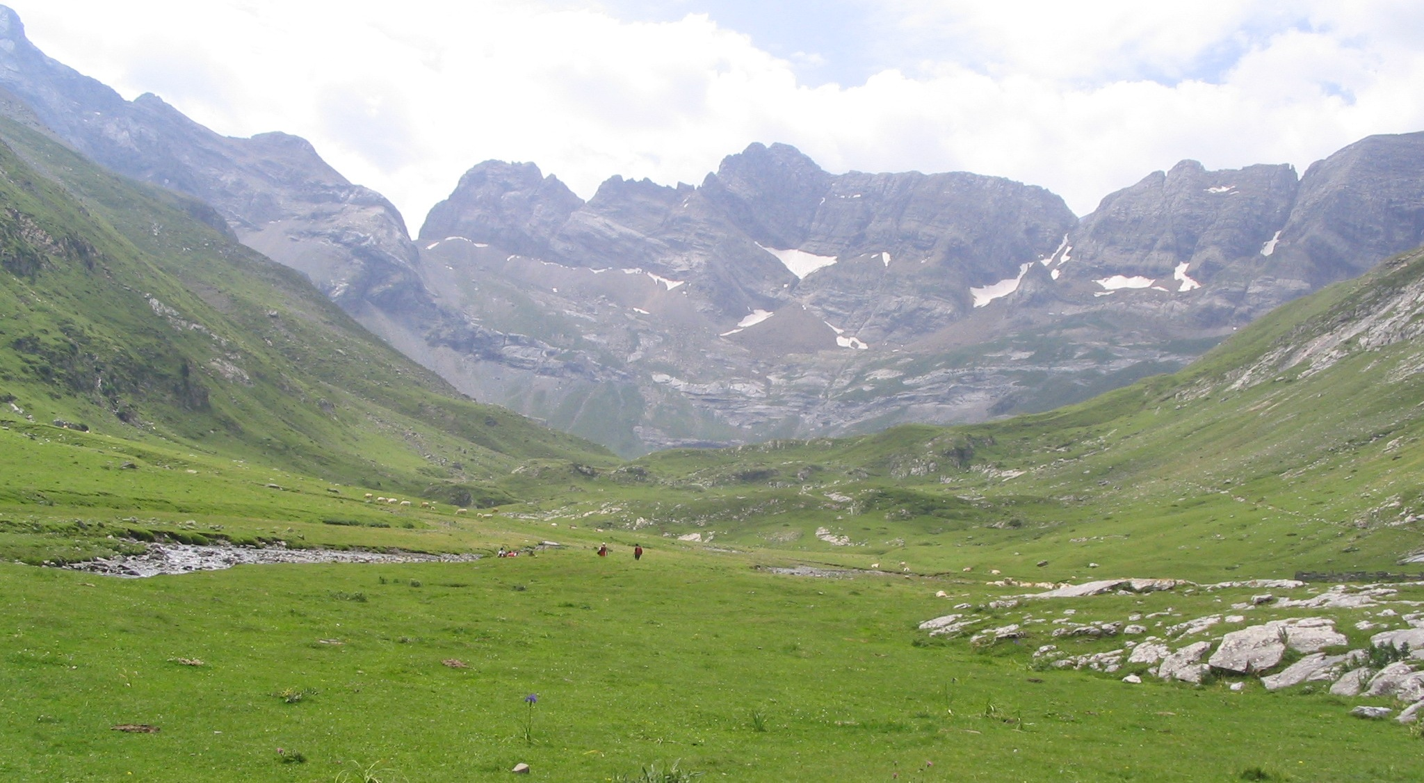 Circo de Estaubé, Pirineos franceses.